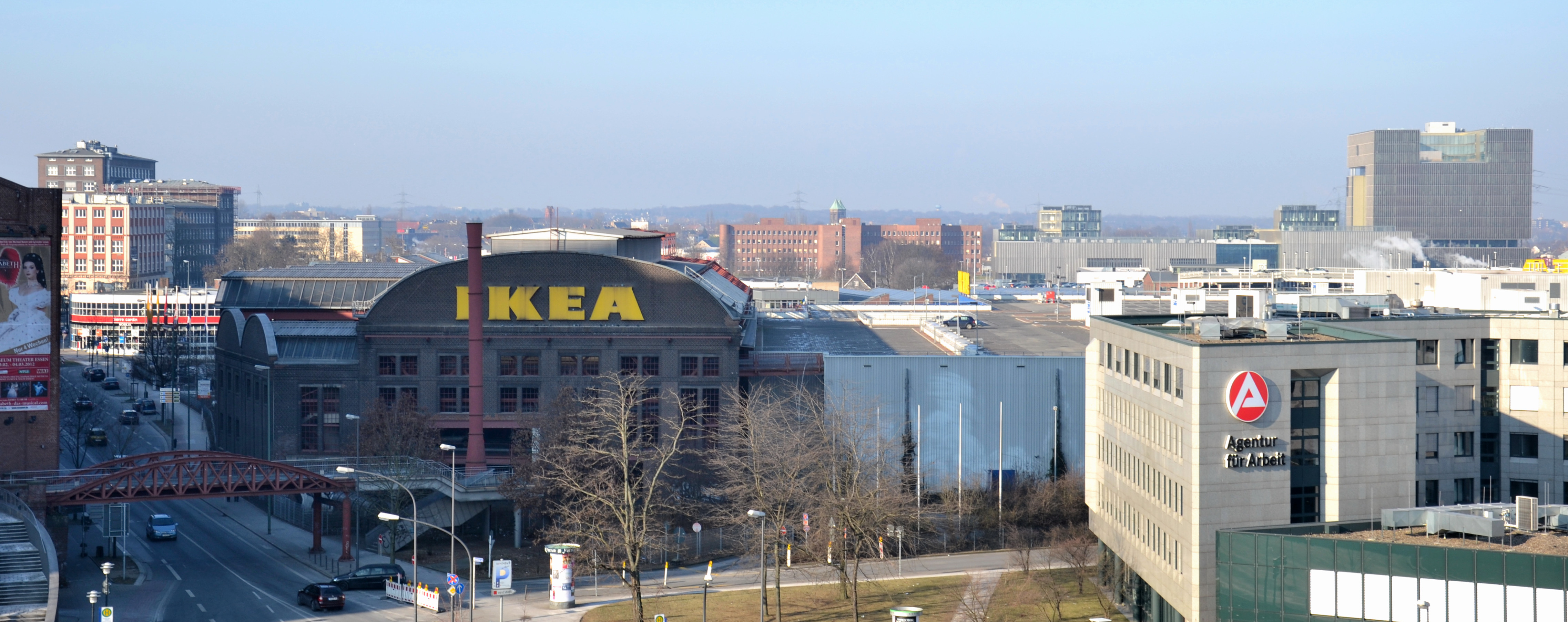 Essen-Westviertel, Blick von Osten